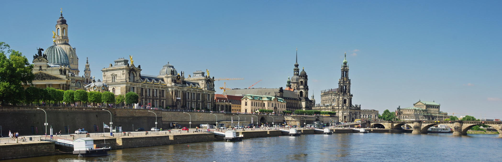 Dresden, Panoramabild, „Canaletto-Blick“ Blick aus Richtung Carolabrücke auf die Altstadt-Silhouette